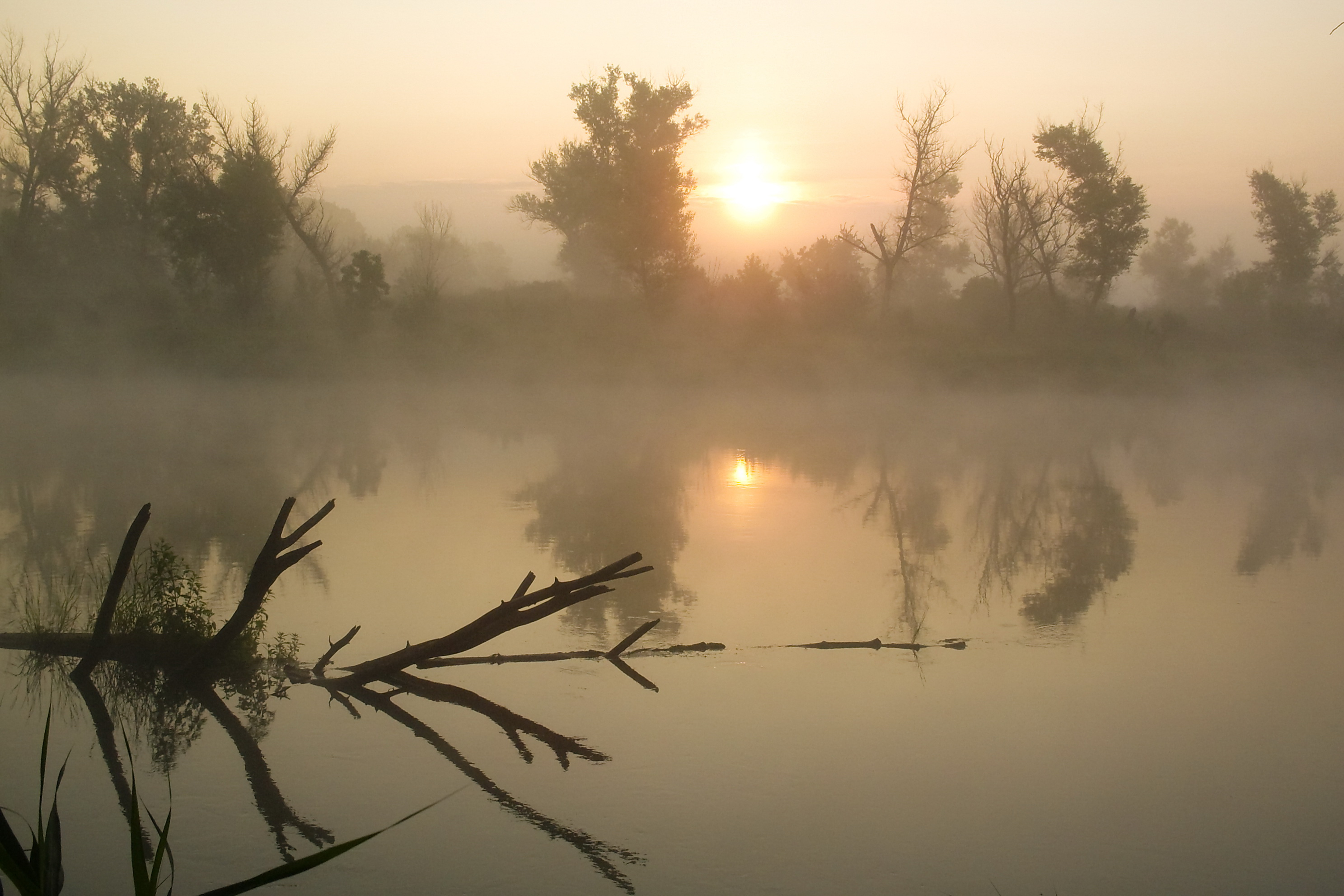 Річка сіверський Дінець. Літній ранок